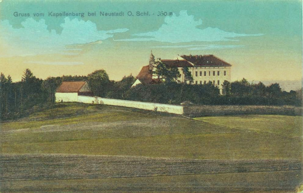 Sanktuarium Matki Boskiej Bolesnej w Prudniku na Kaplicznej Górze, 1910